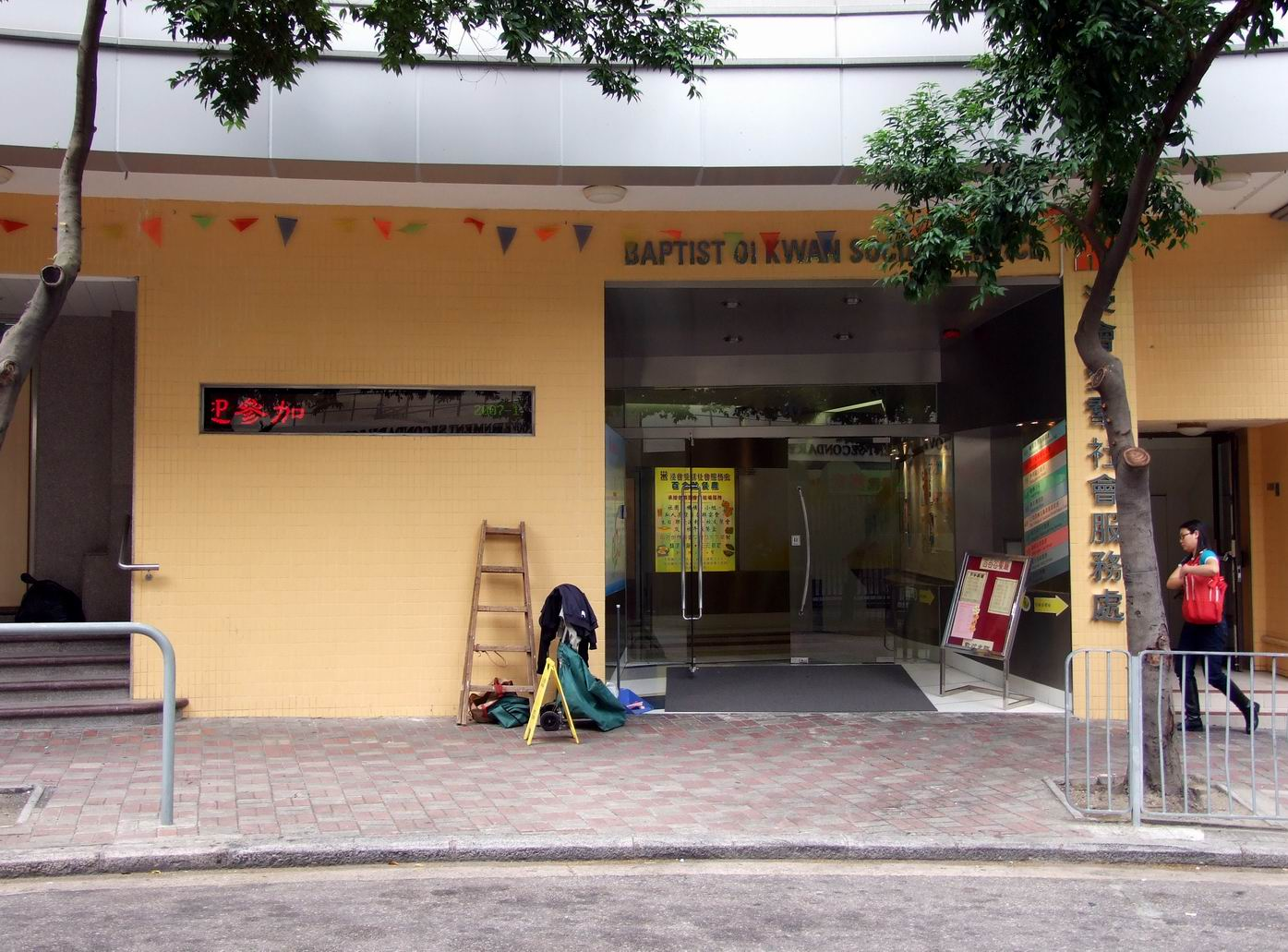 浸會愛群社會服務處